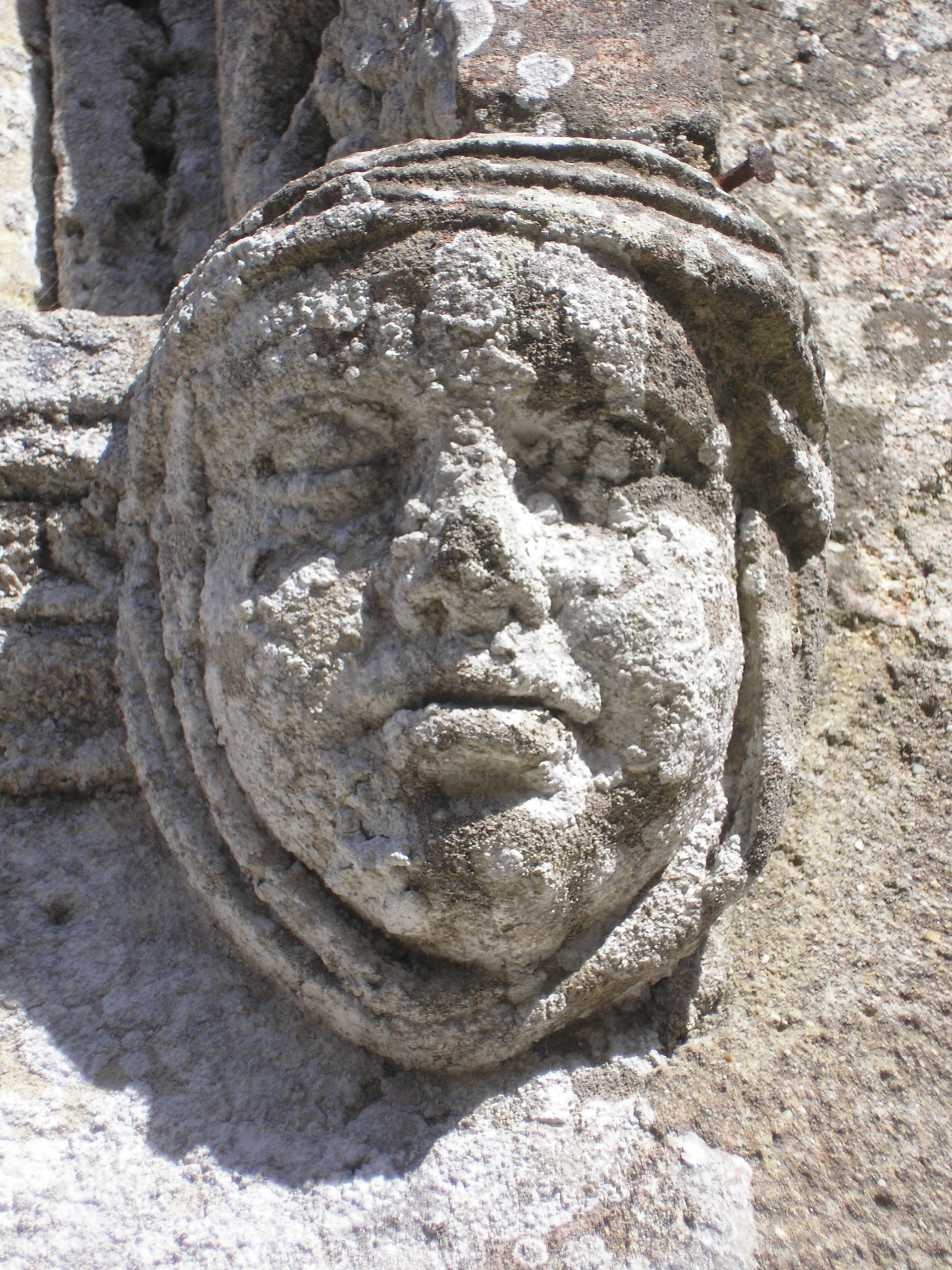 Vaucelles (Normandie, France). Mascaron du portail de l'église Saint-Cyr-et-Sainte-Judith.